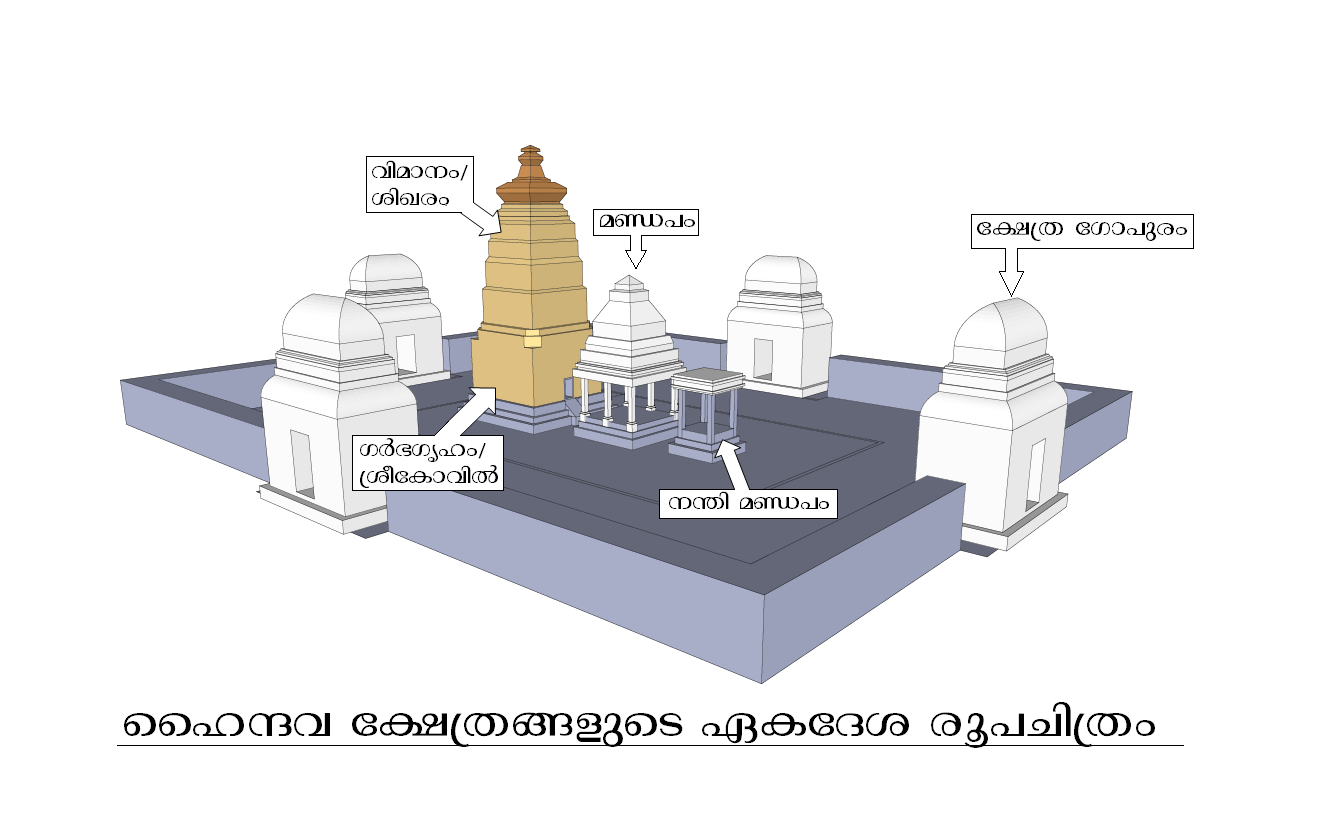 ഒരു ഹിന്ദു ക്ഷേത്രത്തിന്റെ ലഘു രൂപചിത്രം